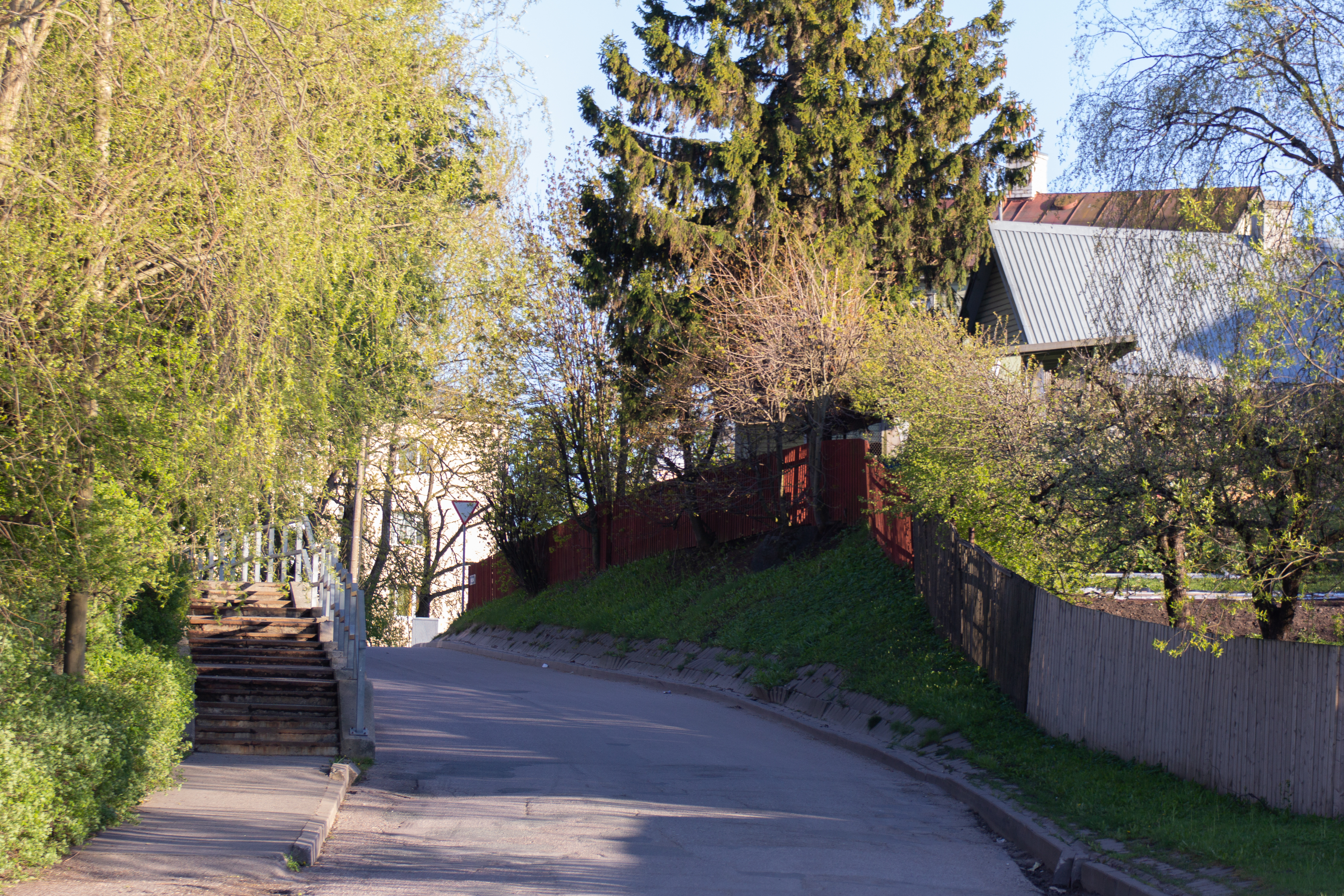 Nõlva tänava algus